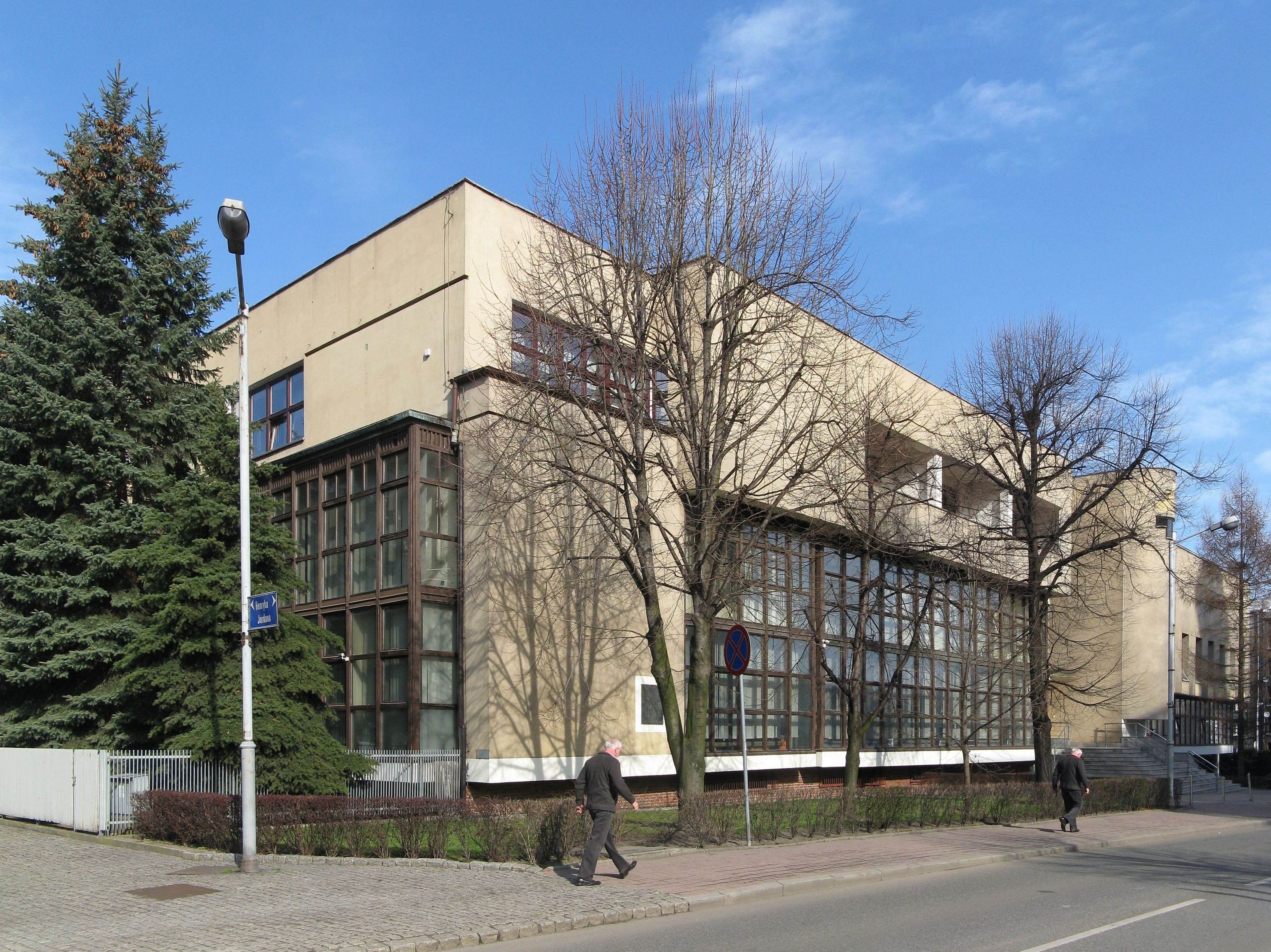 The building in Katowice, Wita Stwosza 11 street, Poland.